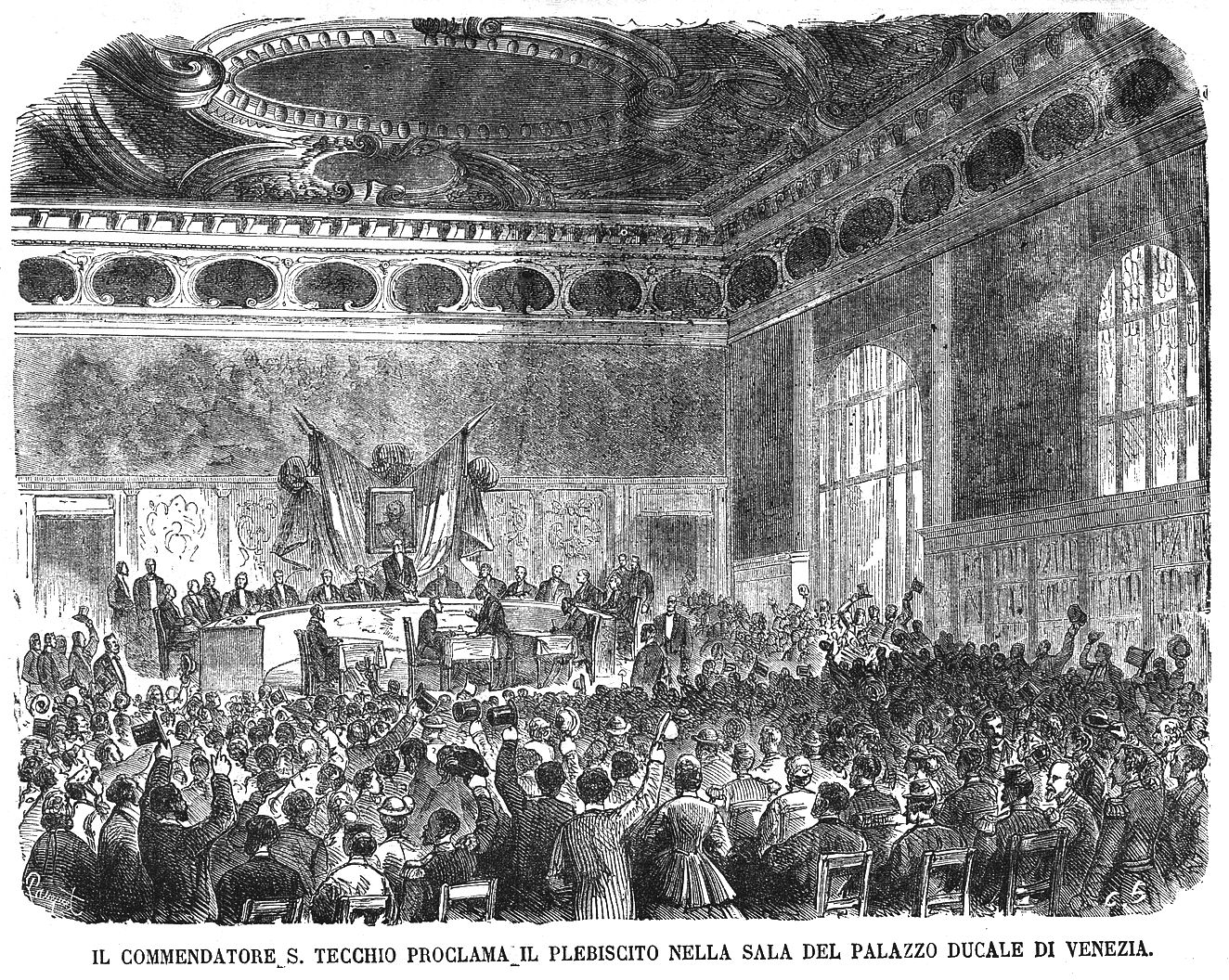 Proclamazione del plebiscito